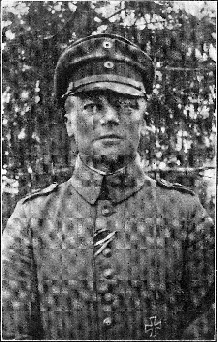 Hauptmann v. Graeffendorff, Kommandeur des Bataillons und späterer Ritter des Pour le Mèrites